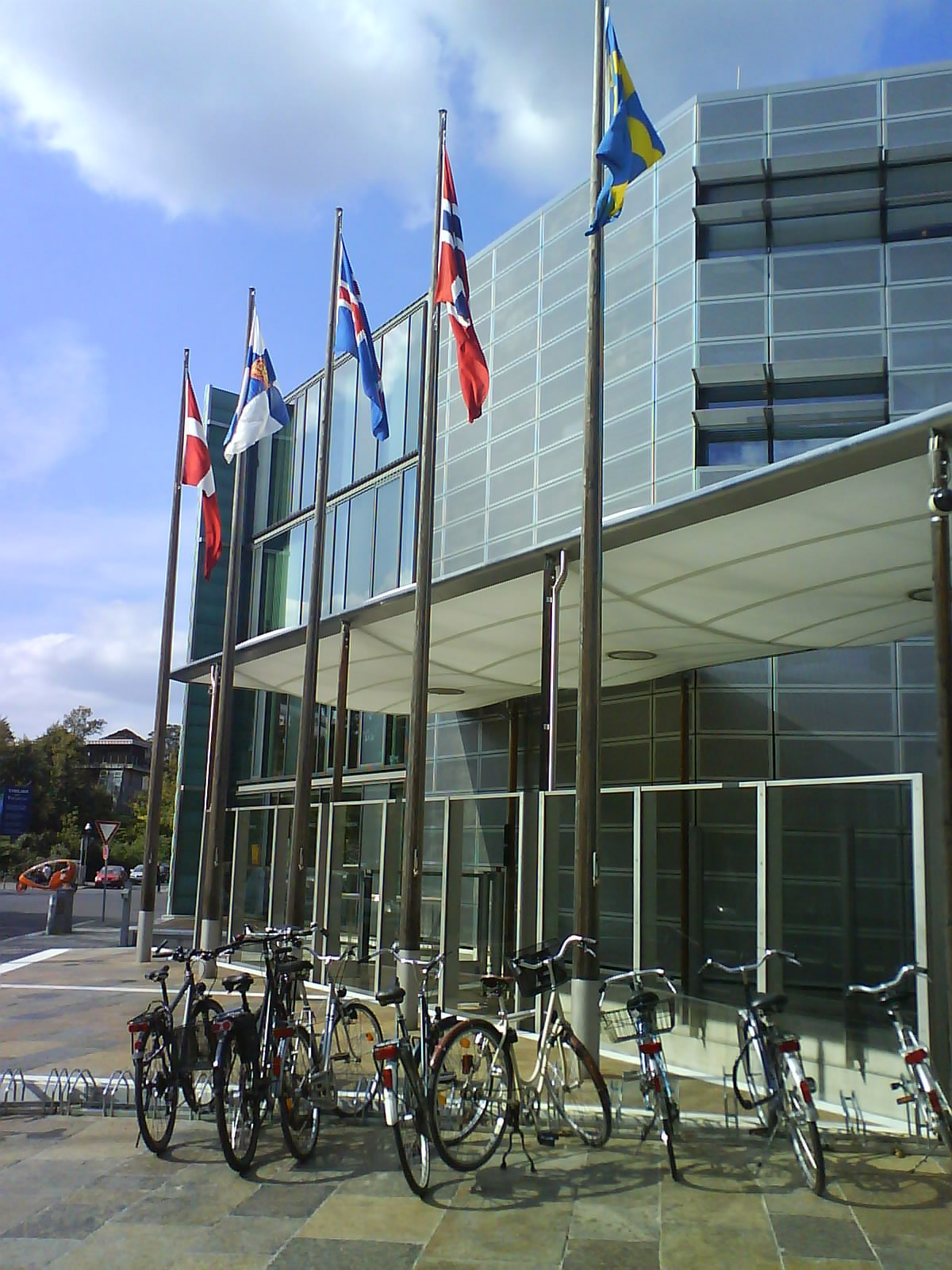 Nordische Botschaften Berlin